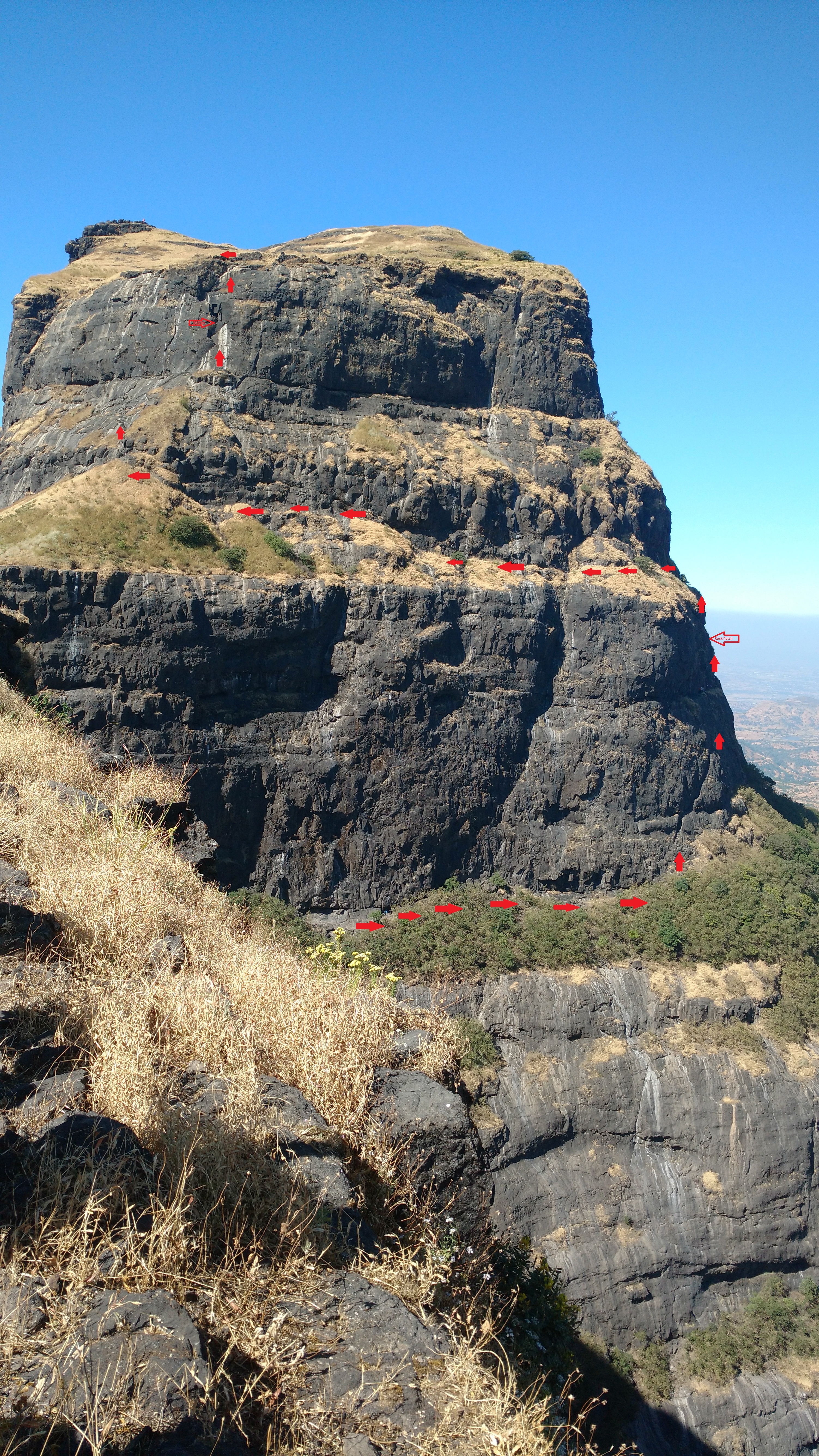 Madangad Fort ; Trek route on Madangad fort